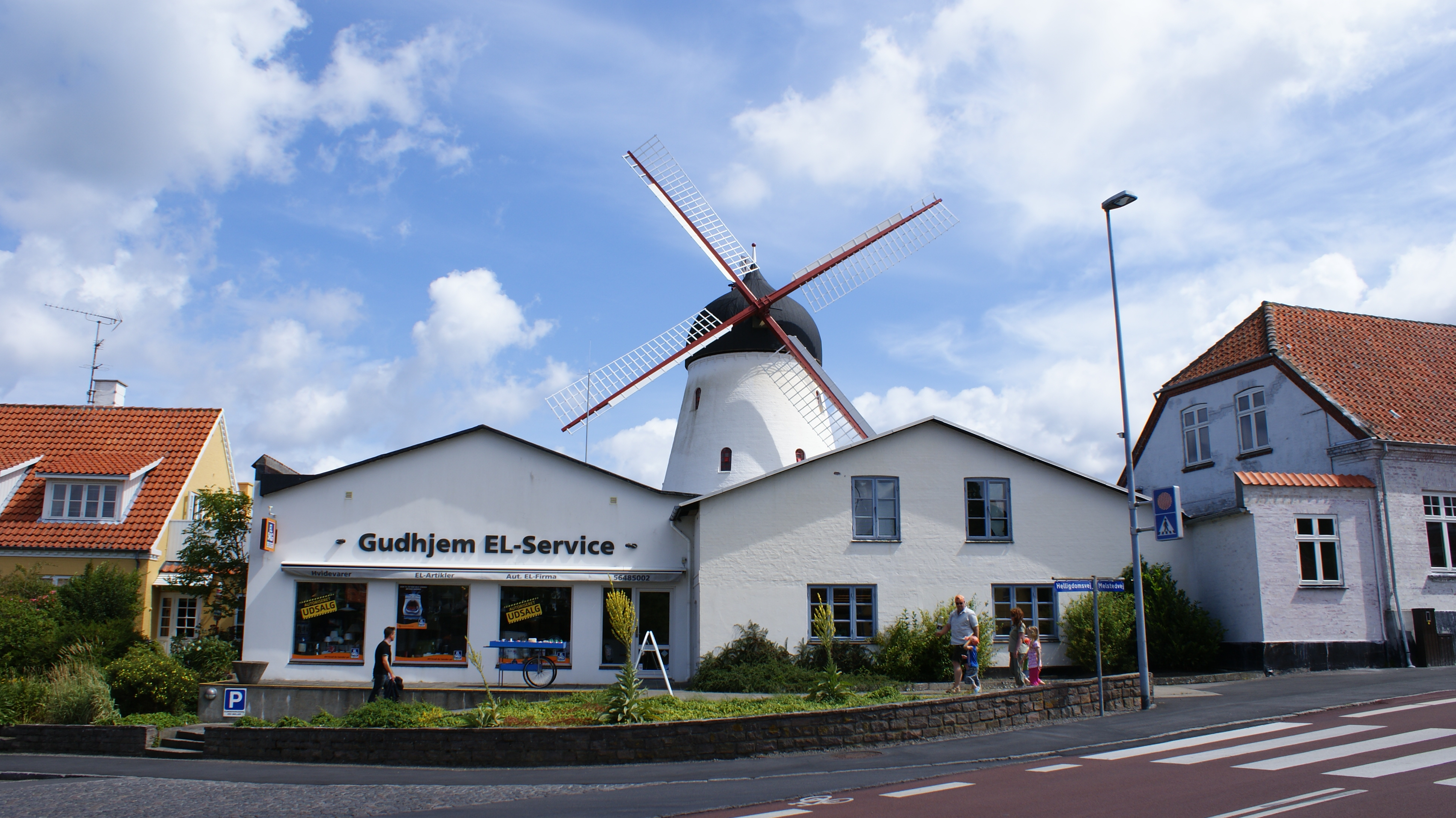 Windmill at Gudhjem, Bornholm, Denmark. Built 1893.